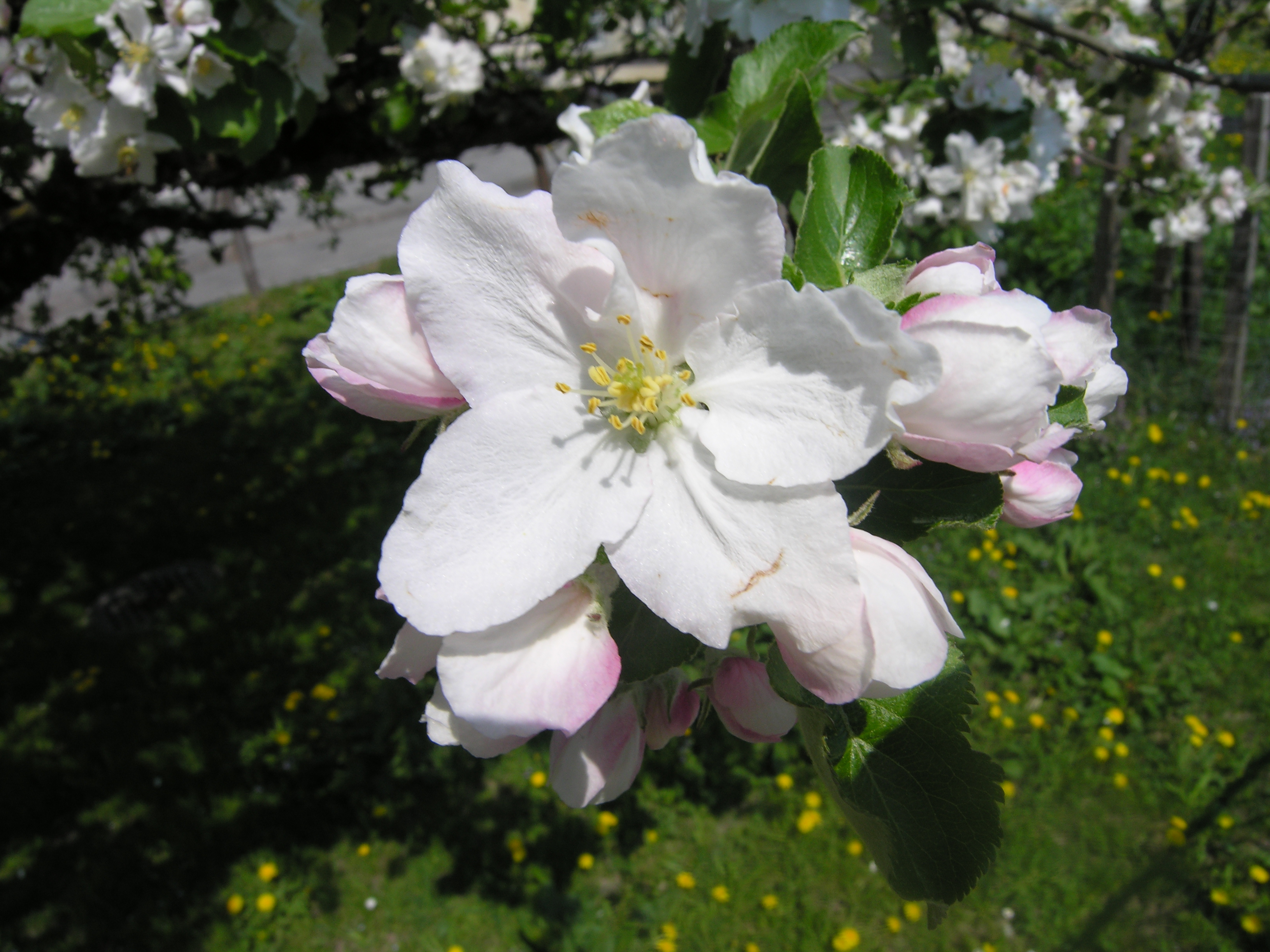 Apple blossum